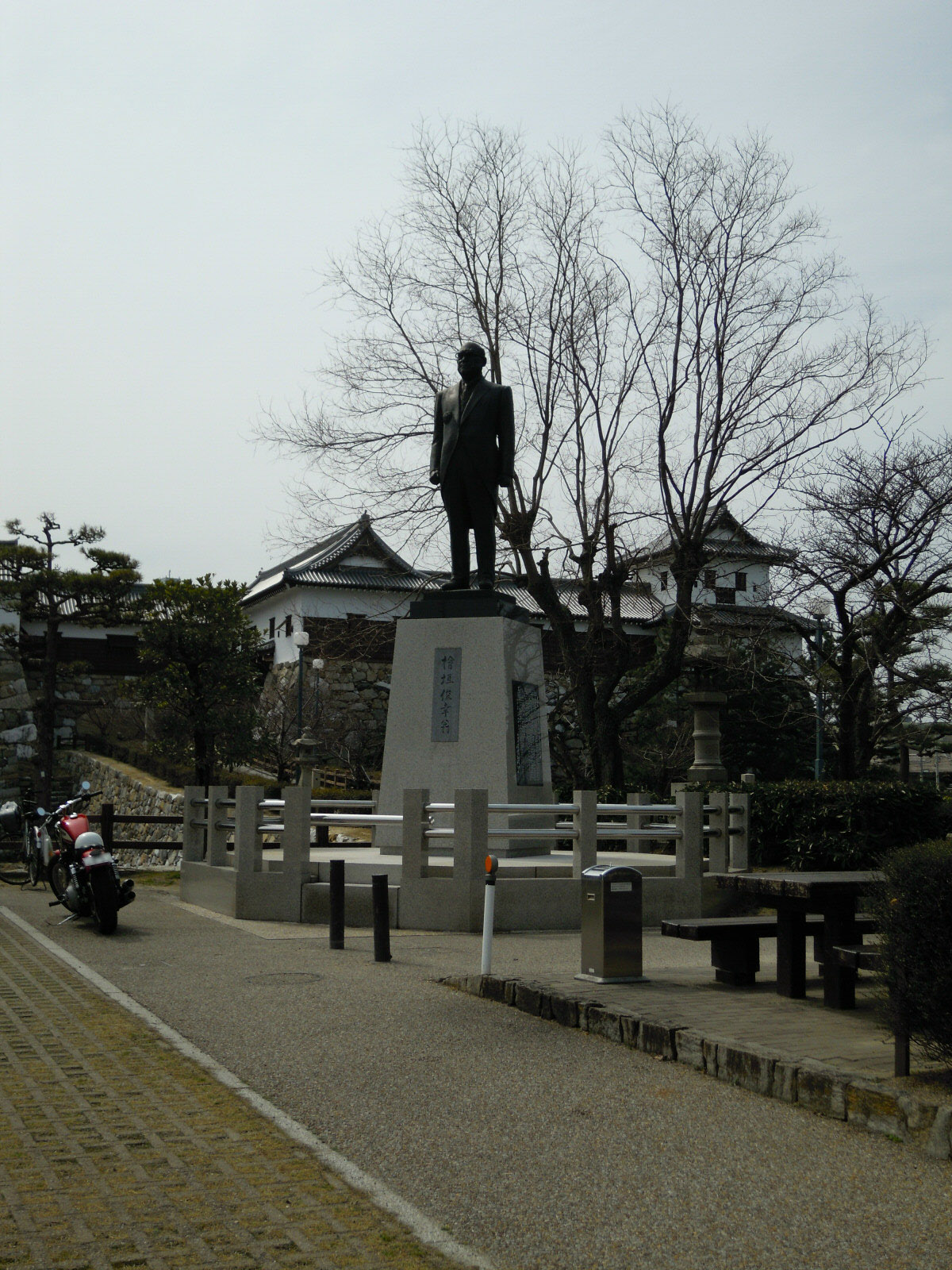 Imabari Castle